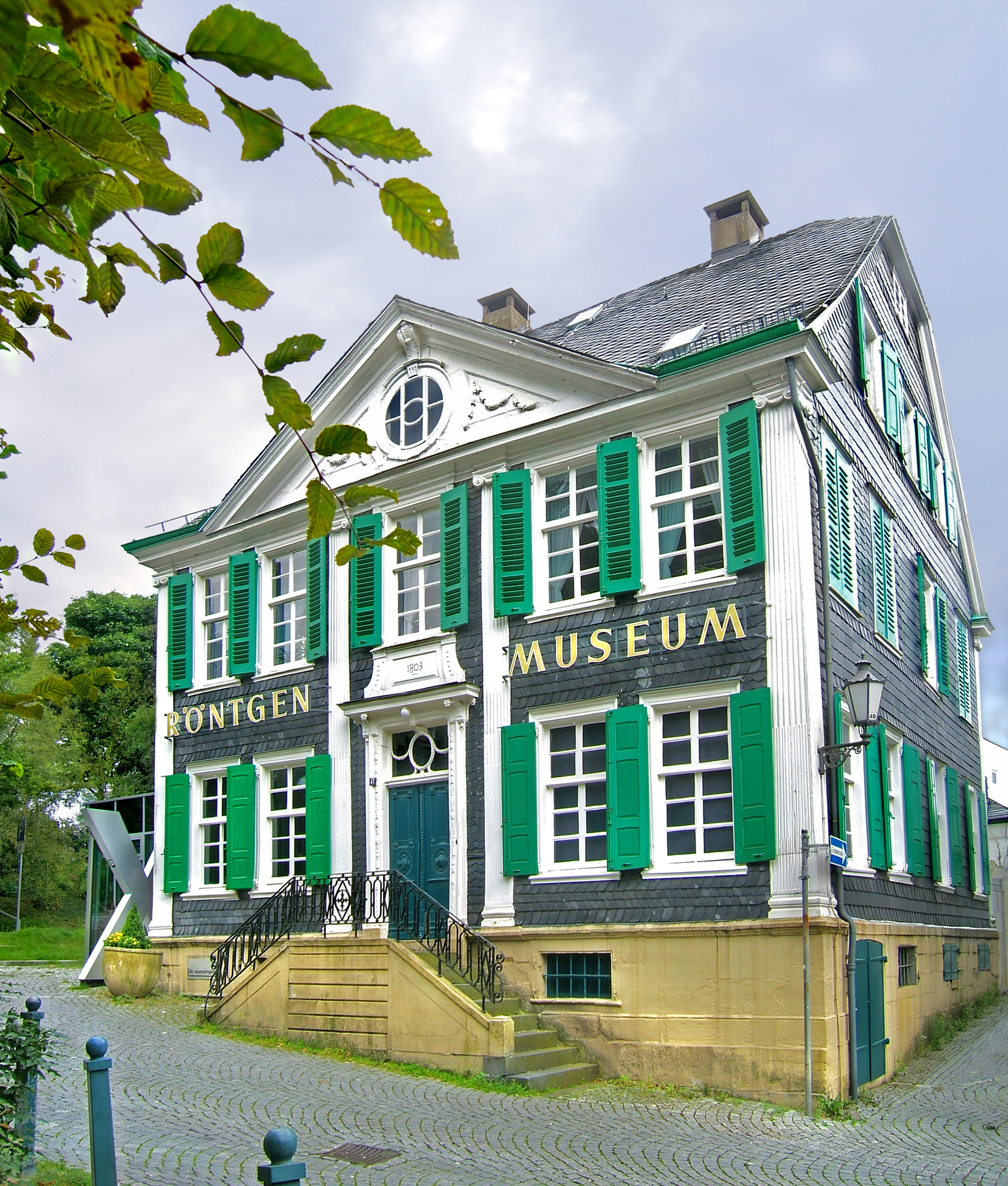 Remscheid-Lennep, Deutschland.